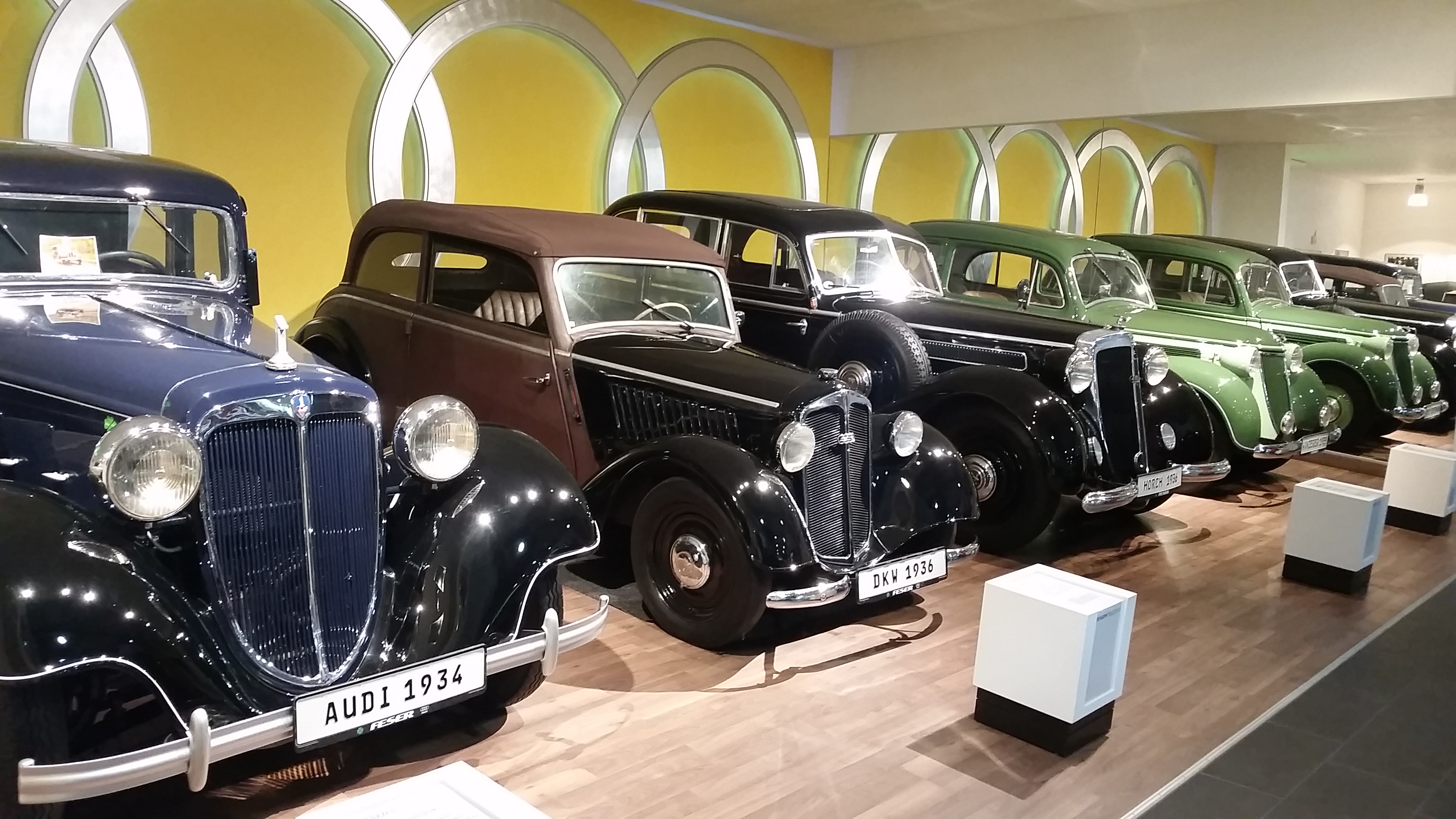 Innenansicht des Feser-Graf Museums in Schwabach